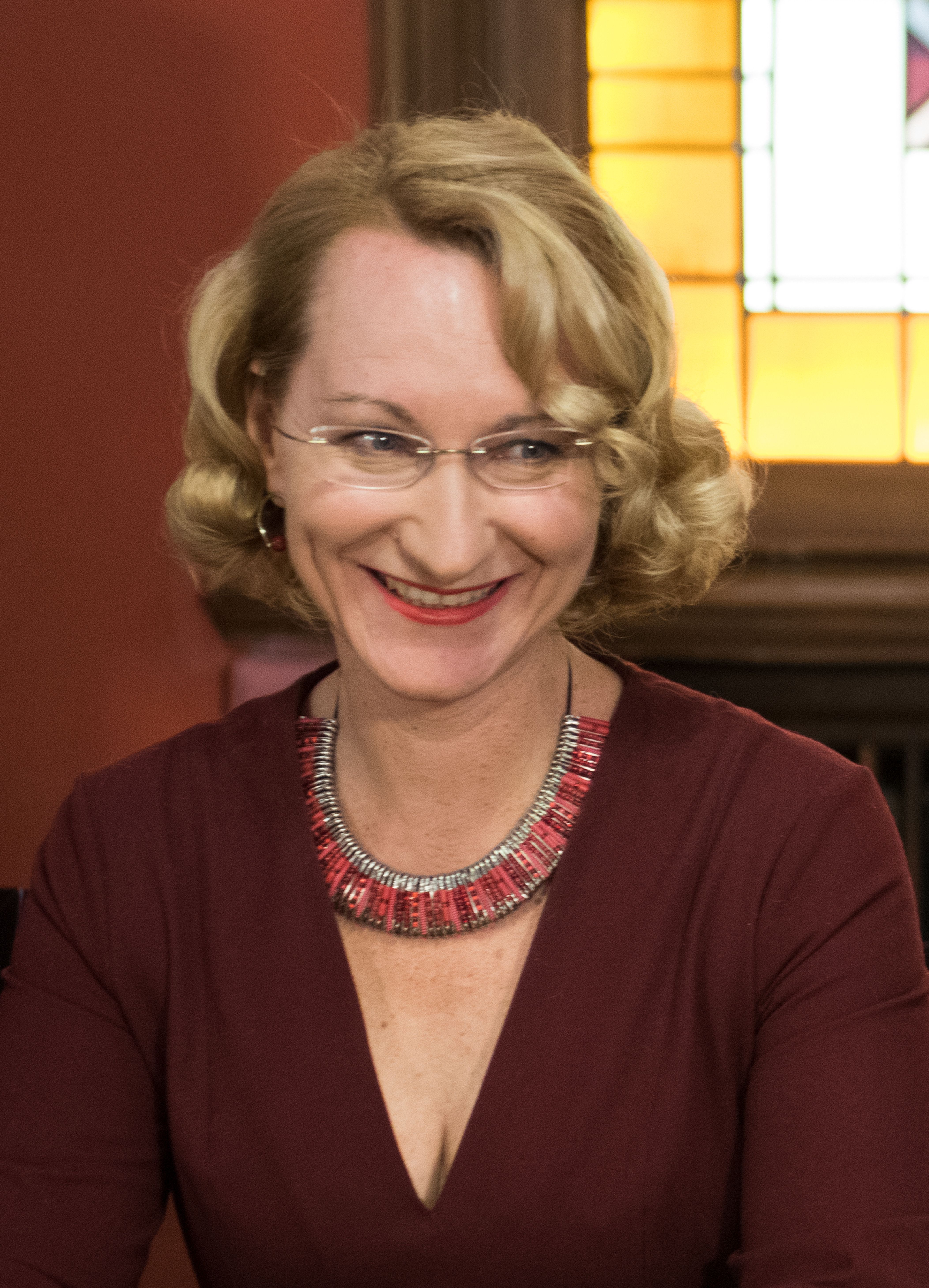 2019.gada 23.janvāris. 13.Saeimā pārstāvēto un valdību veidojošo politisko partiju – partiju apvienības “Jaunā Vienotība”, politiskās partijas “KPV LV”, Jaunās konservatīvās partijas, partiju apvienības “Attīstībai/Par!” un Nacionālās apvienības “Visu Latvijai!”-“Tēvzemei un brīvībai/LNNK” – sadarbības līguma, Fiskālās disciplīnas līguma un Krišjāņa Kariņa vadītā Ministru kabineta deklarācijas svinīgā parakstīšana. Foto: Ieva Ābele, Saeima Izmantošanas noteikumi: saeima.lv/lv/autortiesibas